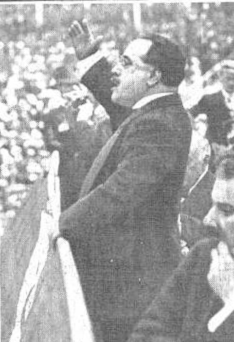 Los oradores, perorando.